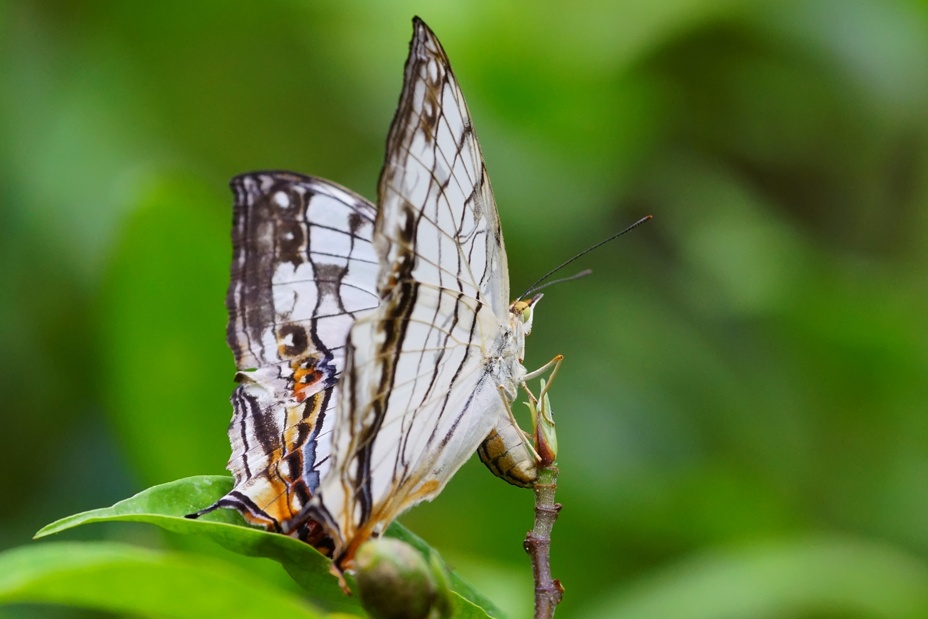 網絲蛺蝶 Cyrestis thyodamas formosana